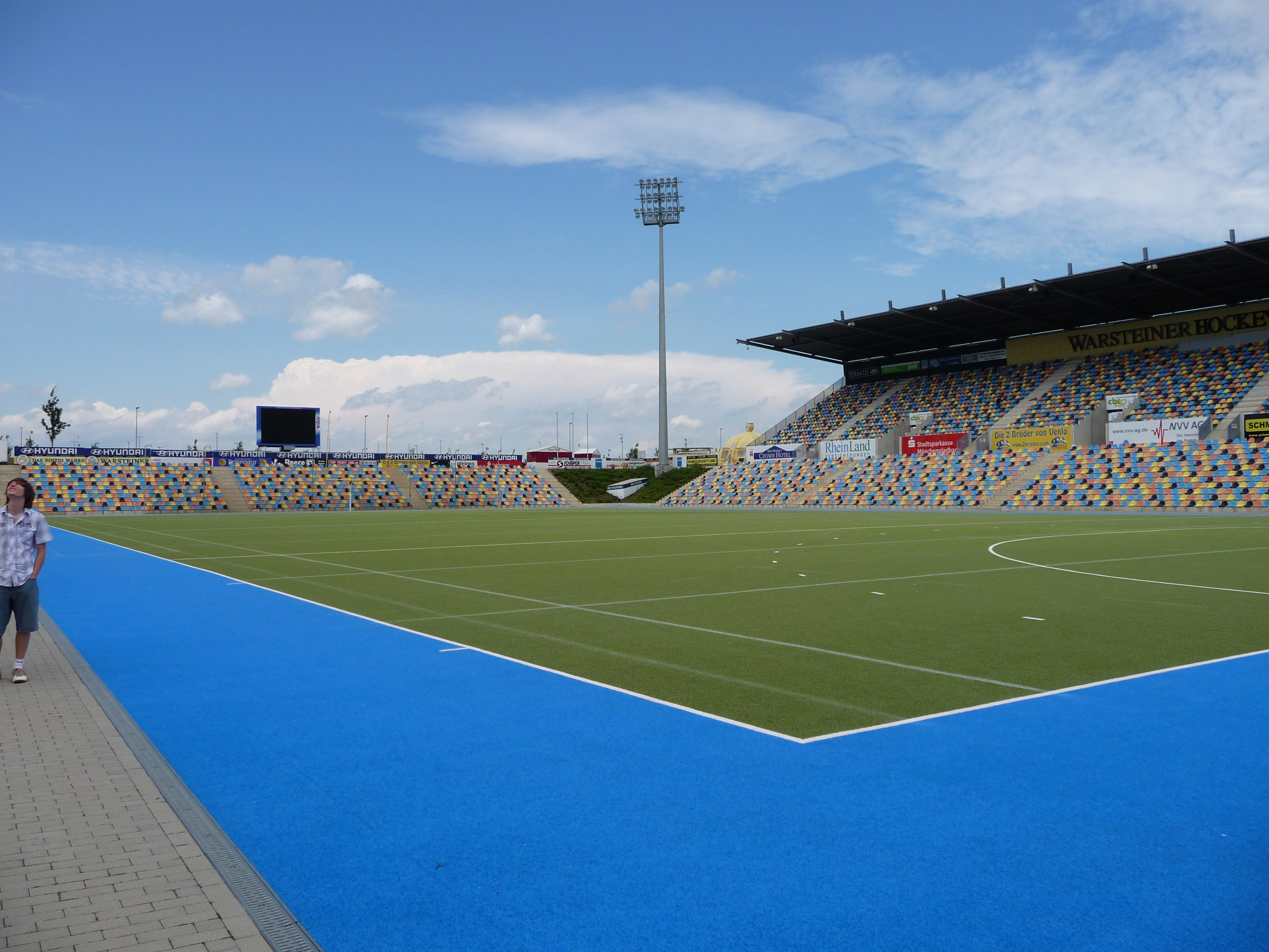 Warsteiner Hockeypark, Mönchengladbach